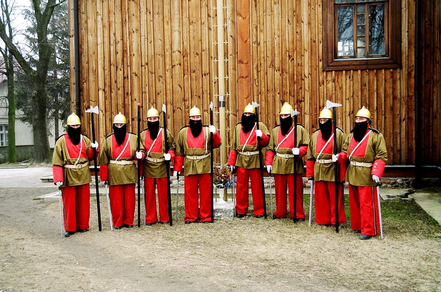 Straż pełniąca wartę przy Grobie Pańskim od wieczora w Wielki Piątek do niedzielnej mszy rezurekcyjnej